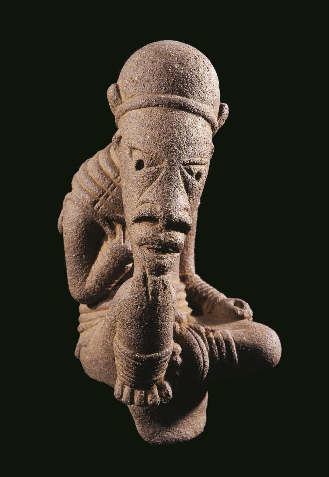 Escultura antropomorfa masculina arrodillada o El pensador. Escultura realizada en terracota, de la cultura Nok (ubicada en Nigeria) y que está datada en el año 298 a.C. Actualmente se encuentra expuesta en la Sala Renacimiento del Palacio de Santa Cruz de Valladolid, dentro de las colecciones de la Fundación Alberto Jiménez-Arellano Alonso.